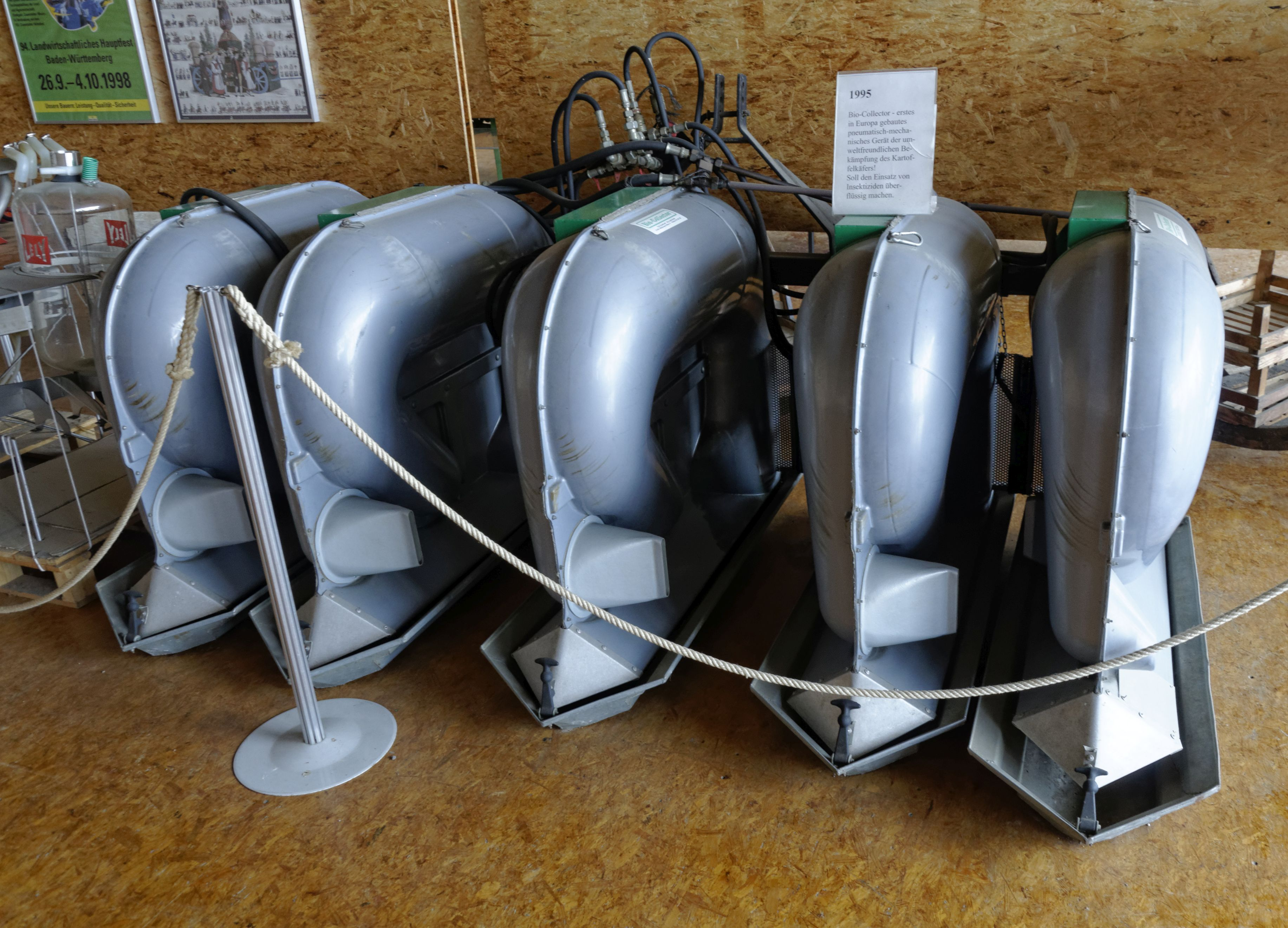 Bilder aus dem Deutsches Landwirtschaftsmuseum in Hohenheim (Stuttgart)